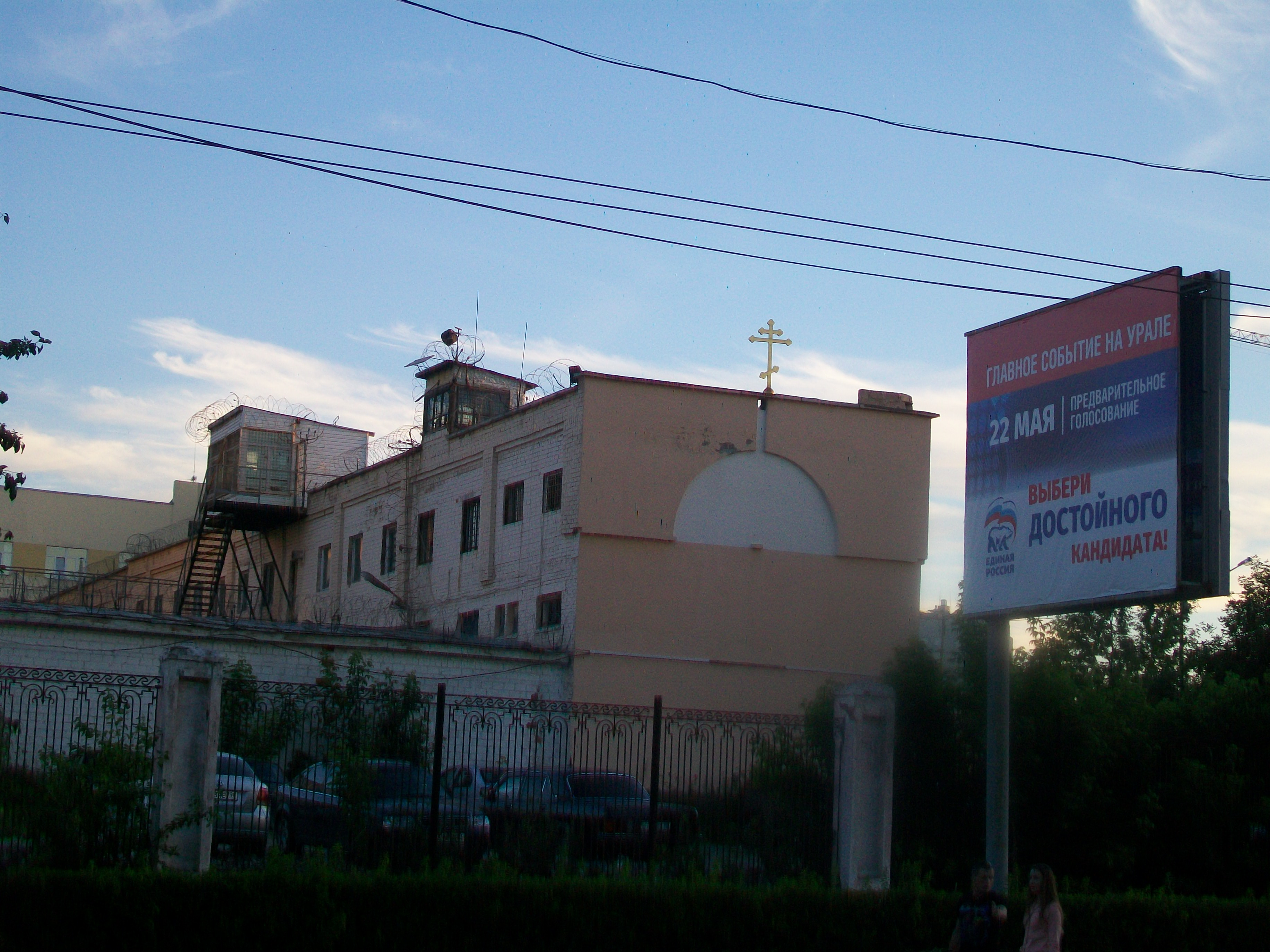 Щит, установленный у исправительной колонии Екатеринбурга с призывом идти на праймериз. При этом заключенные лишены как избирательного права, так и права участвовать в праймериз